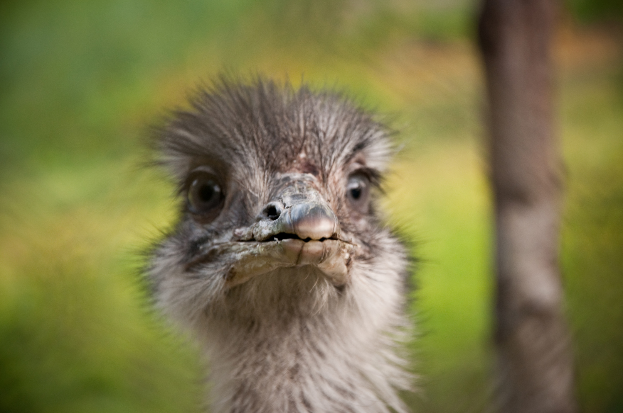 Ñandú en cautiverio en reserva Guaycolec, Provincia de Formosa, Argentina.